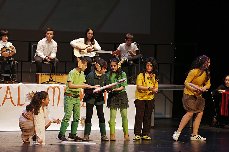 Eskolako gazteak ekitaldian.